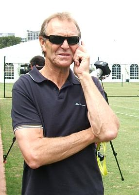 Graham Cornes at Adelaide Oval